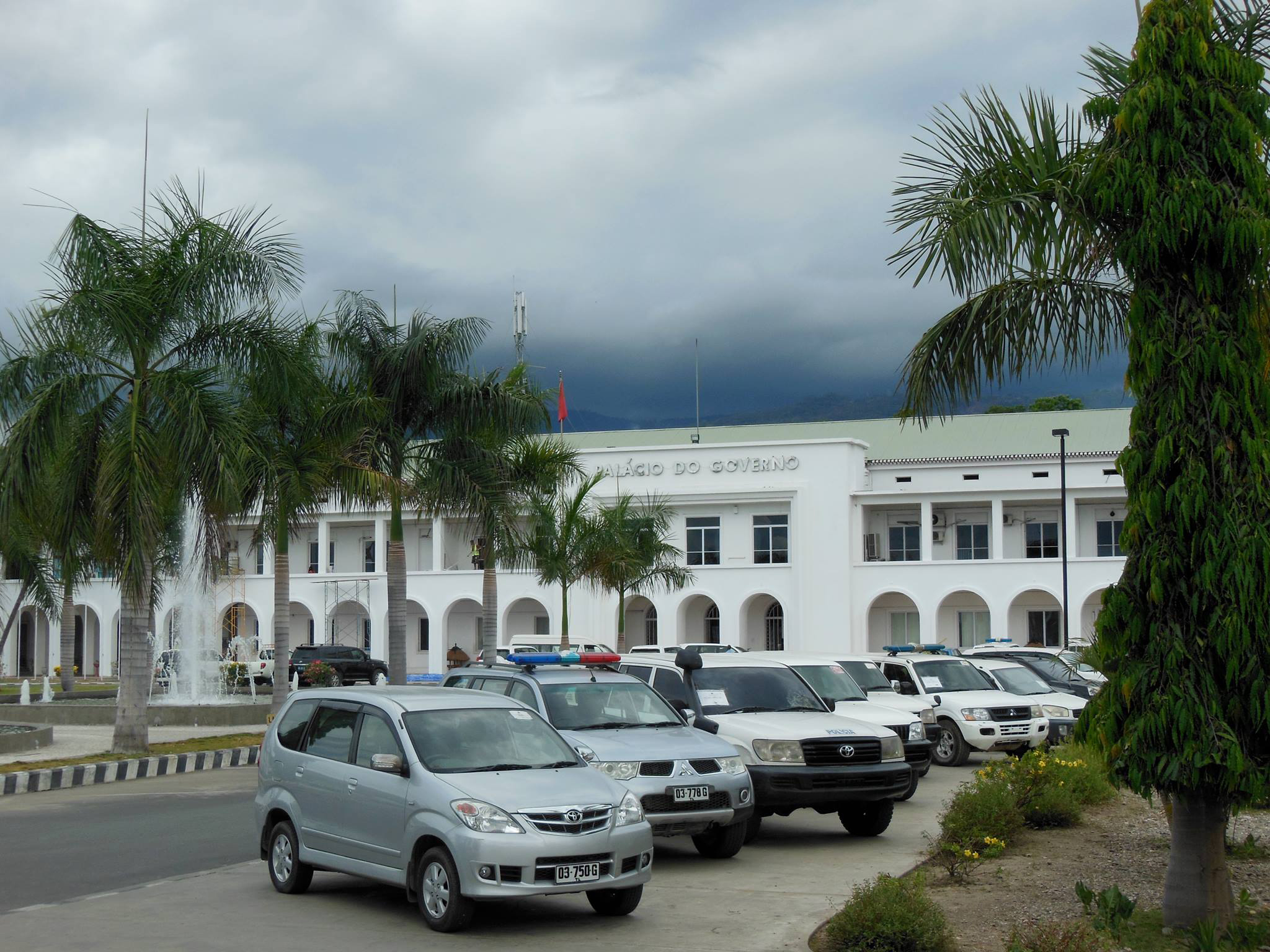 Regierungspalast in Dili, Osttimor